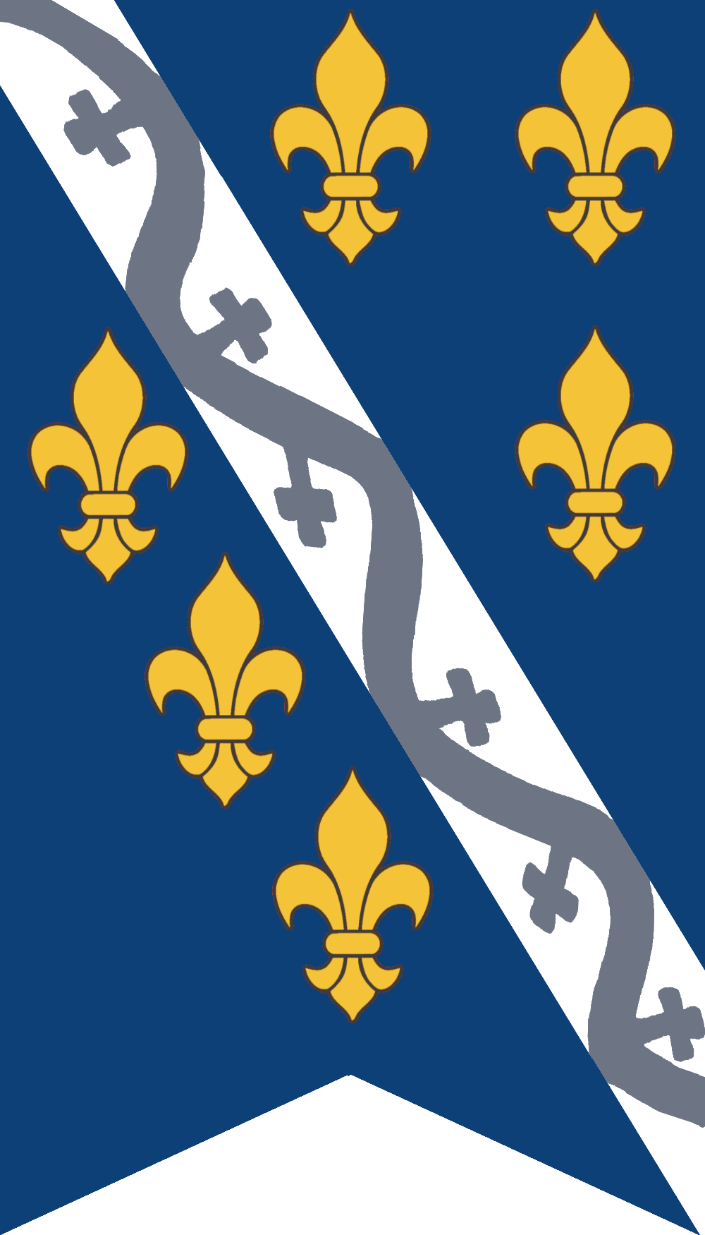 Краљевина Босна стег